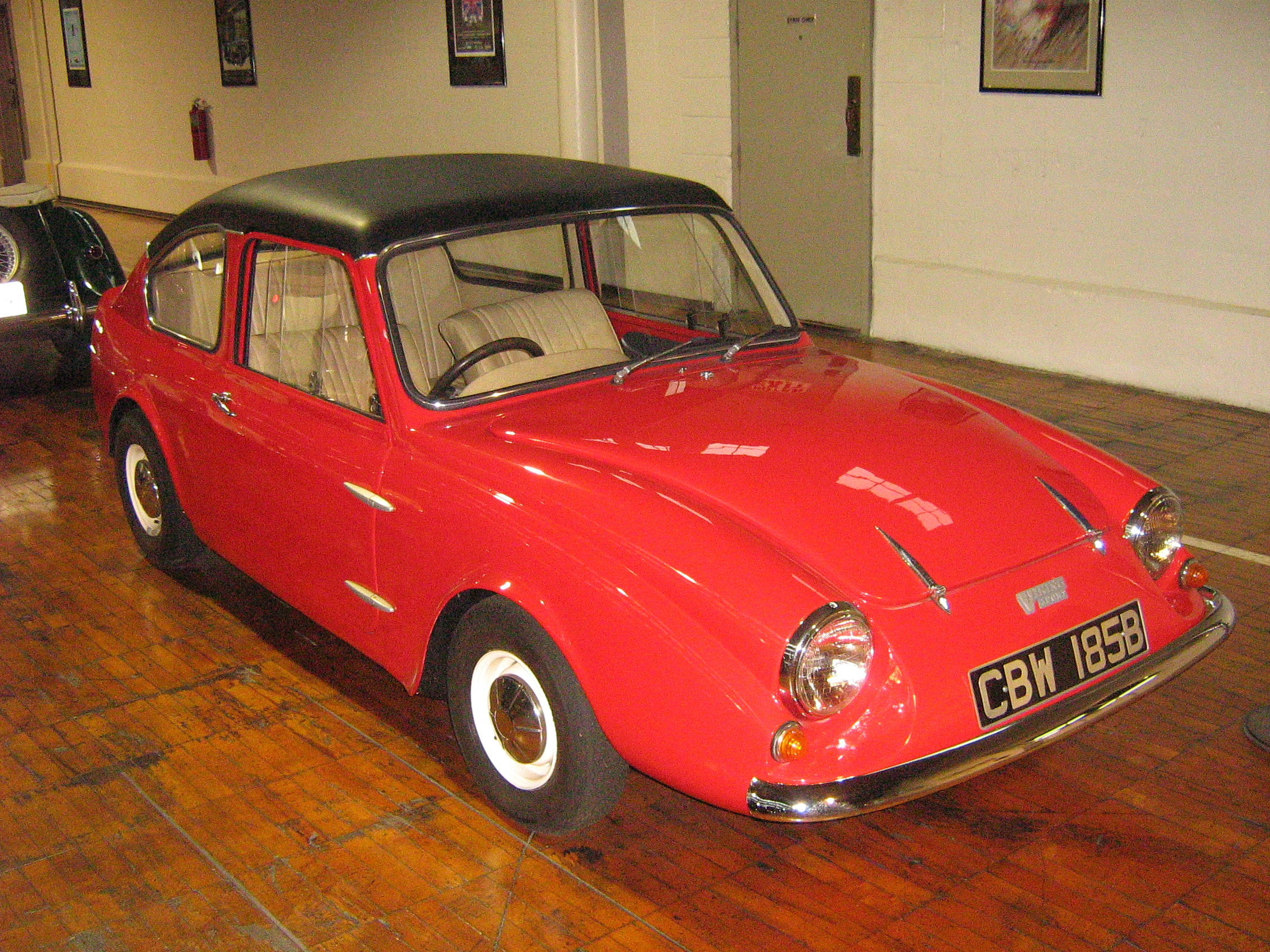 1964 Peel Viking at Lane Motor